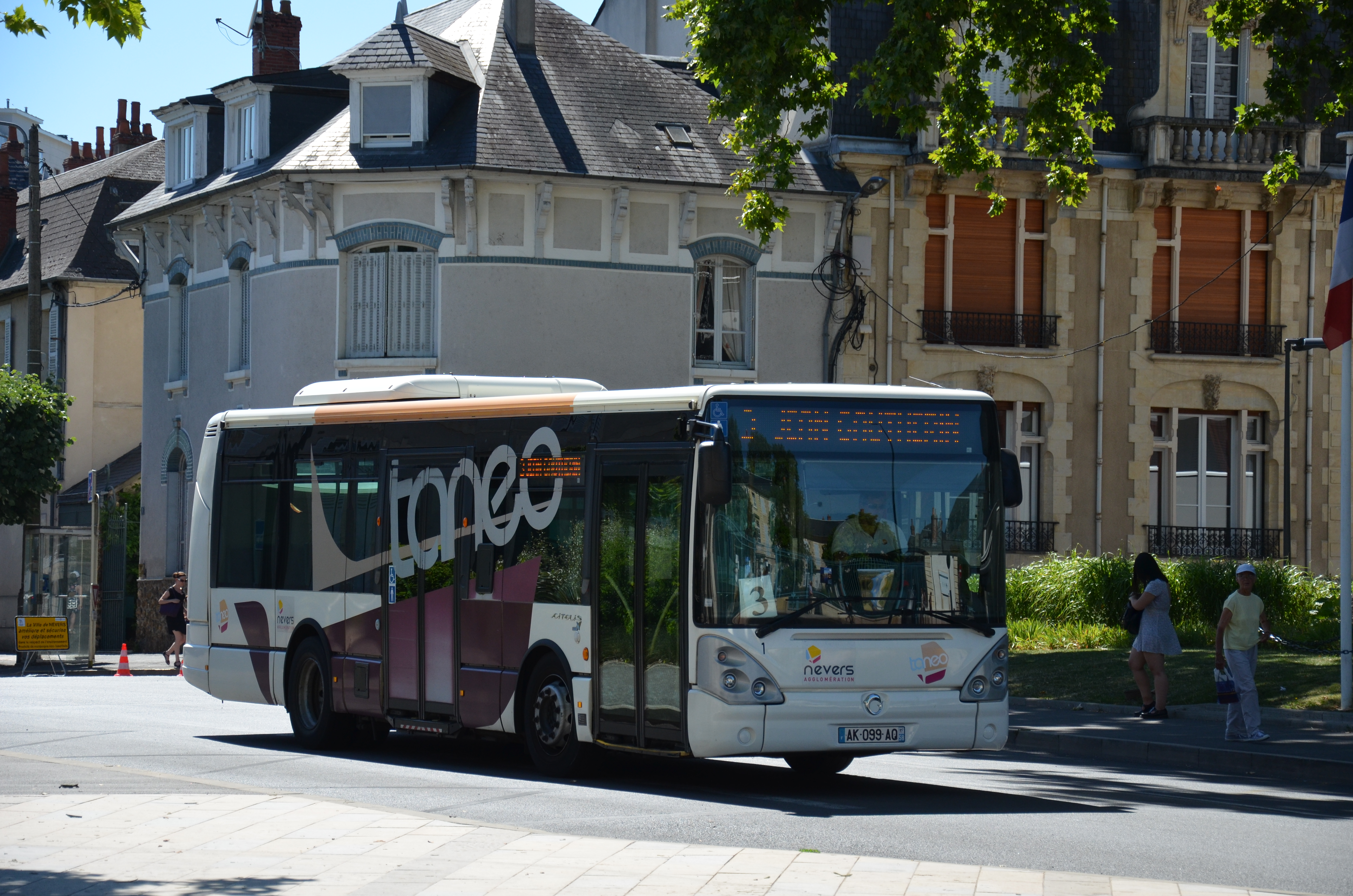 Irisbus Citelis 10 n°01 du réseau TANEO de Nevers, à l'arrêt Résistance.